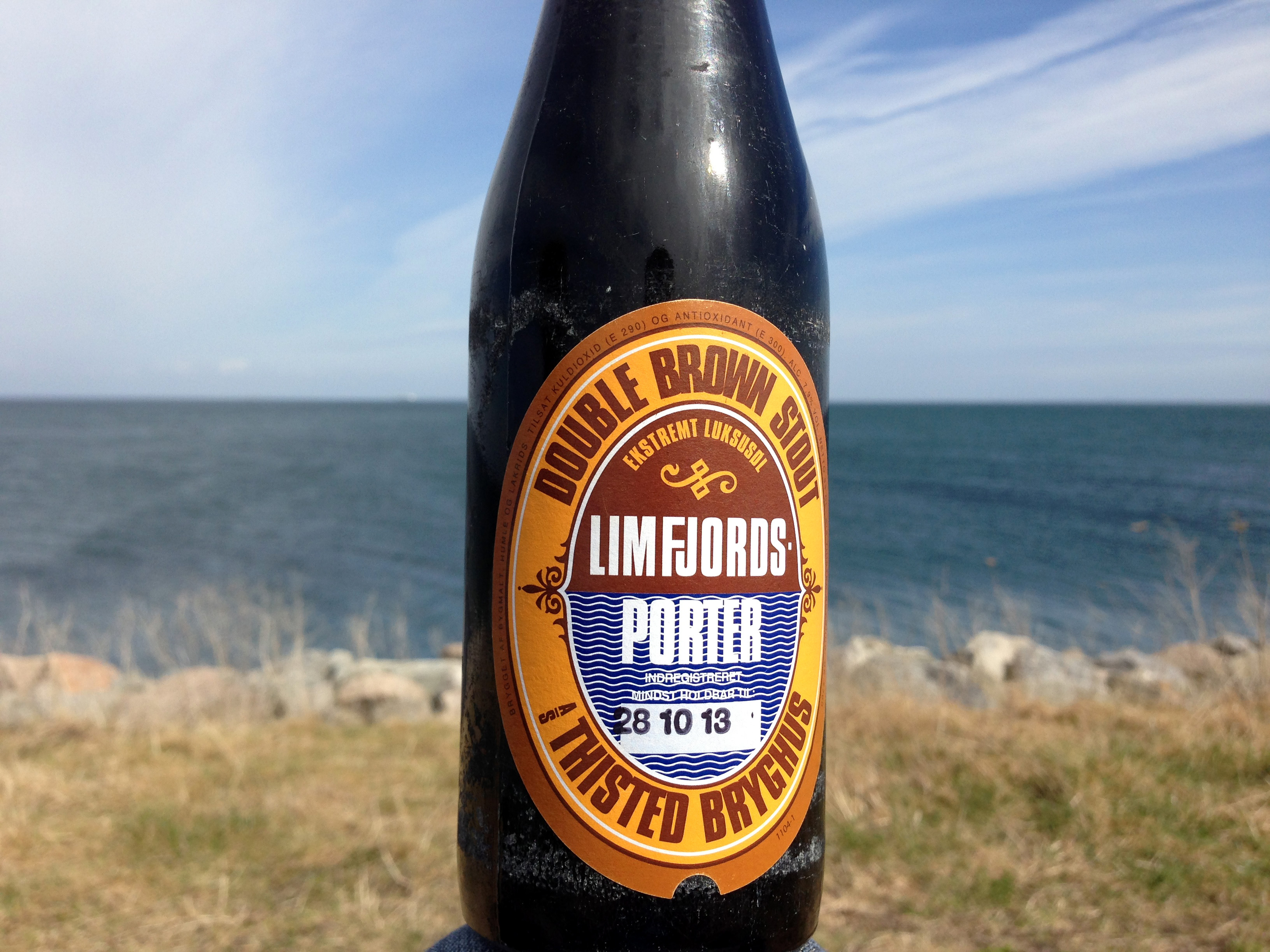 Limfjordsporter